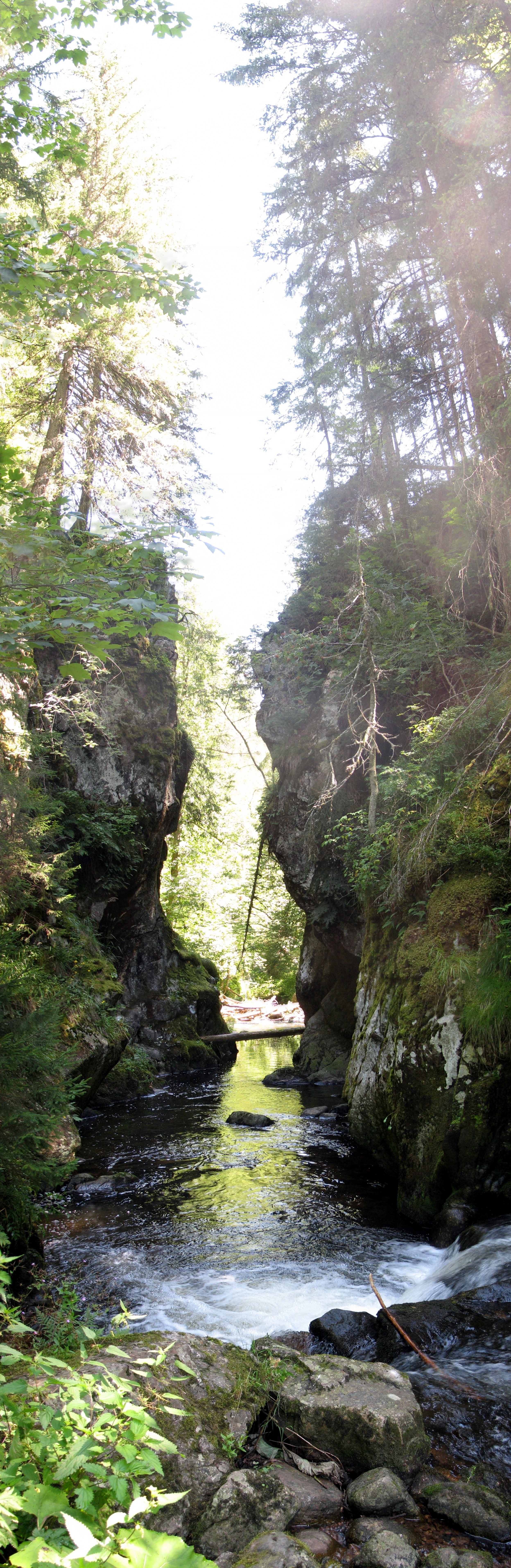 Rechenfelsen an der Haslach (Wutach) am Schluchtensteig